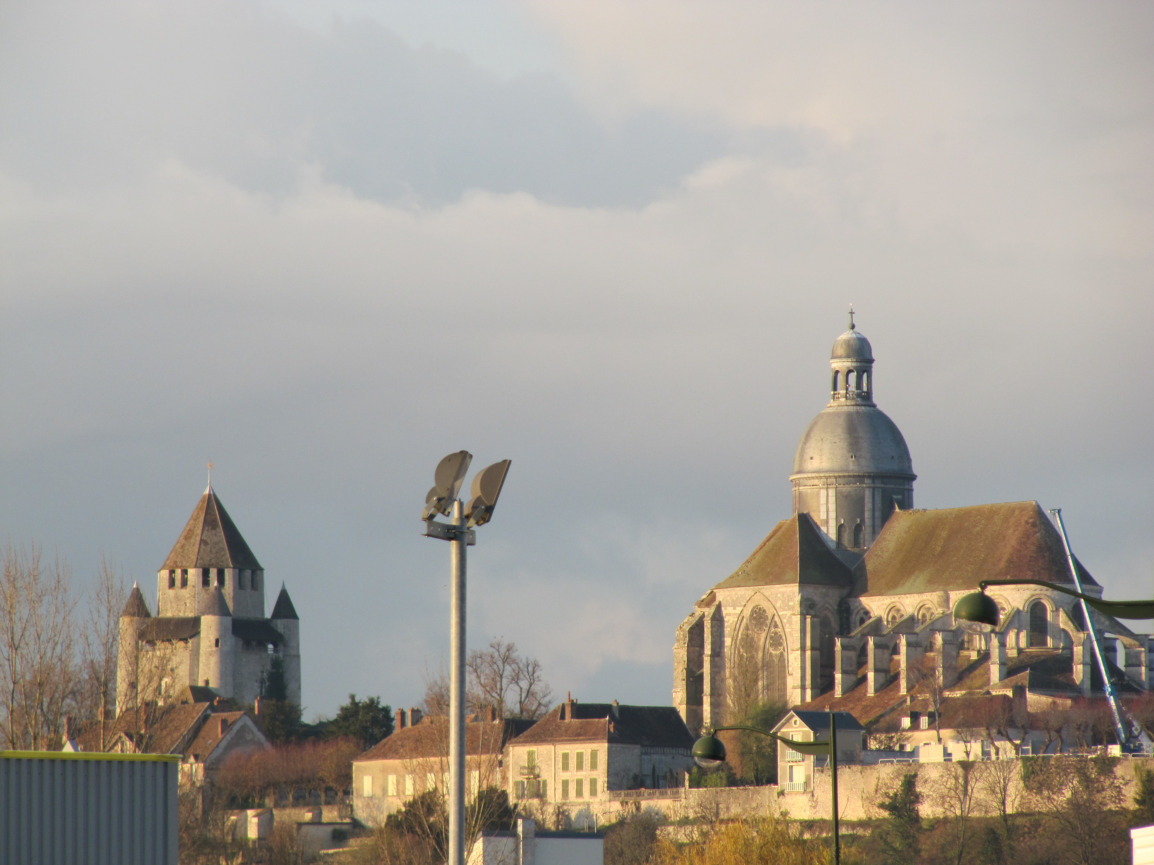 Vue sur les deux monuments les plus hauts de Provins, France : la tour César (à gauche) et la collégiale Saint-Quiriace (à droite). .